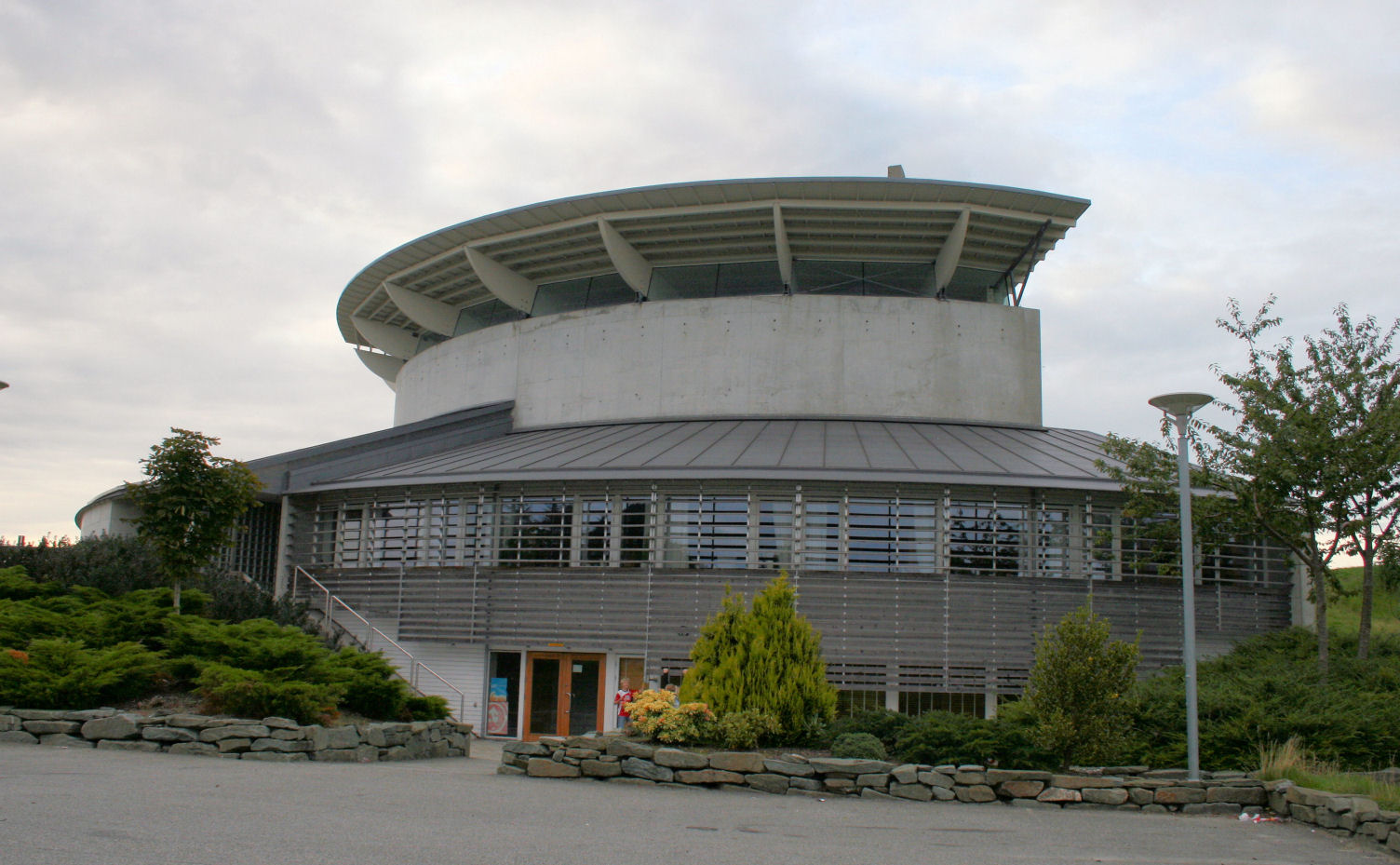 Grødem kirke